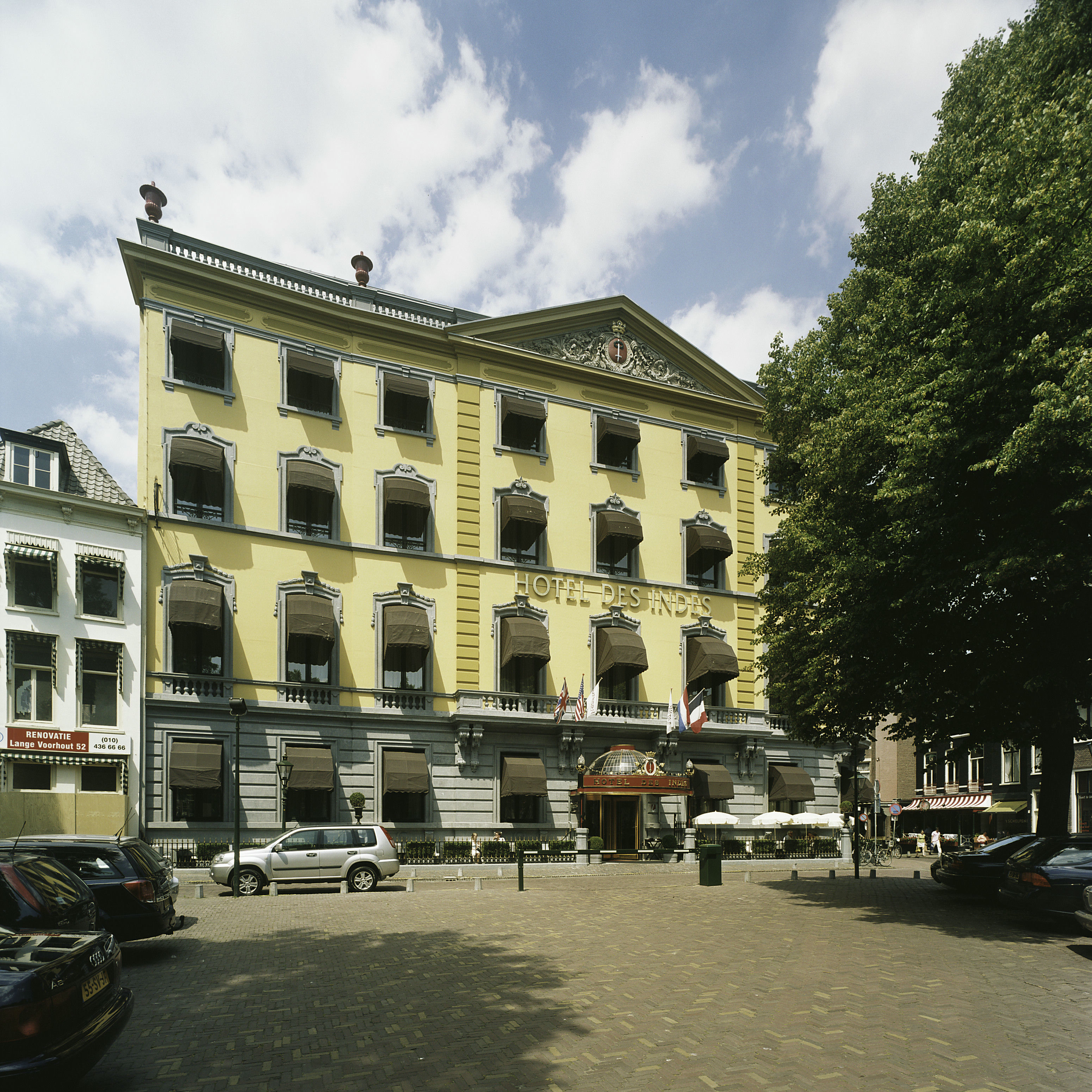 Hotel des Indes: Overzicht van de voorgevel met fronton en de entree